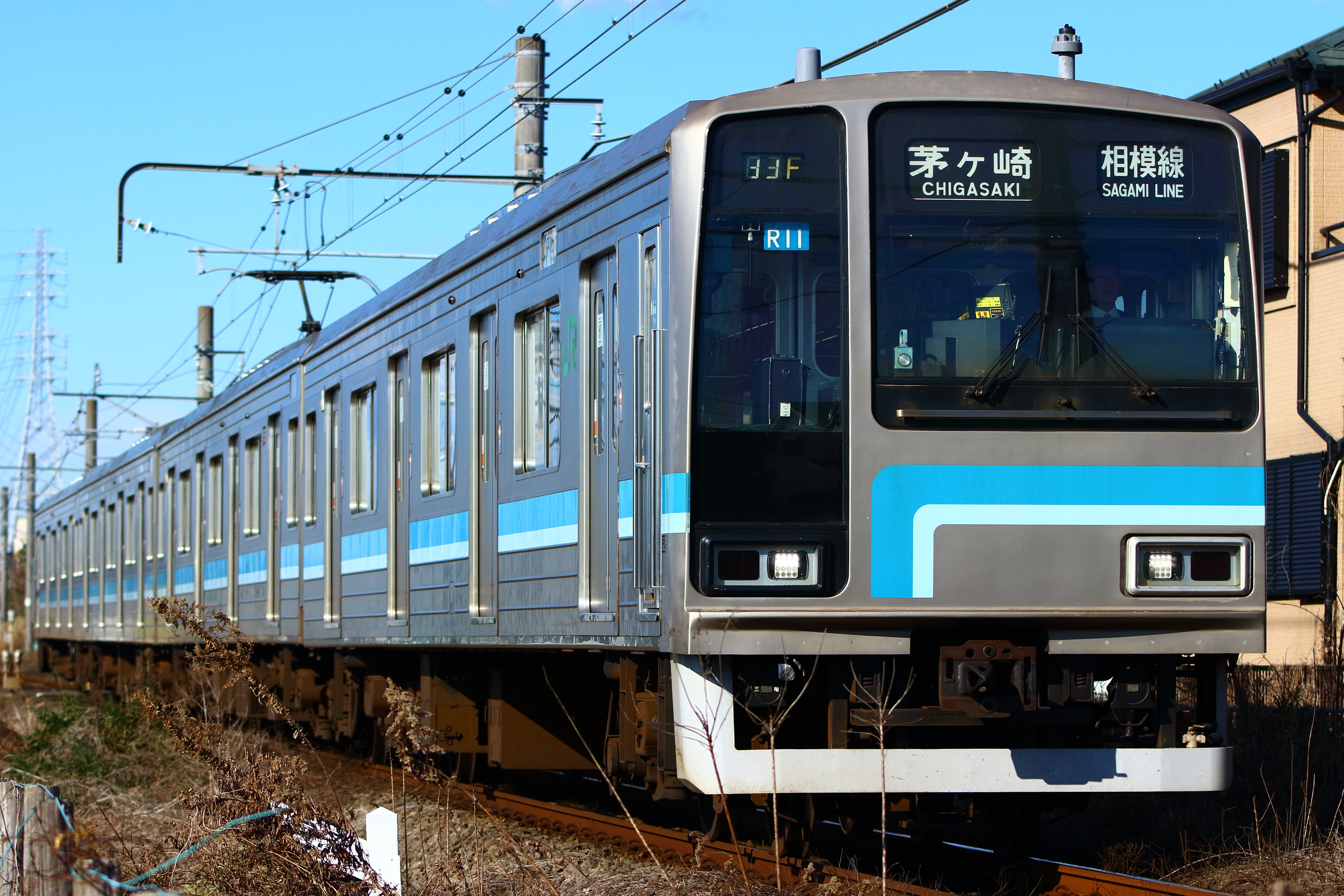 相模線用205系R11編成